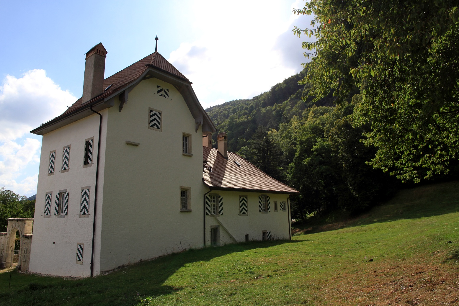 La cure de Baulmes, à l'emplacement d'un ancien chateau fort construit au XVe siècle et presque intégralement détruit.